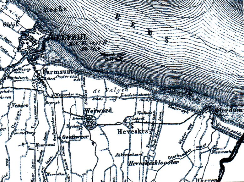 Gedeelte van een kaart, voorstellende de landstreek Oosterhoek bij Delfzijl, getekend door J. Kuyper en gepubliceerd in de Gemeente Atlas van Nederland, uitgegeven in 1867-1871 door H. Suringar te Leeuwarden